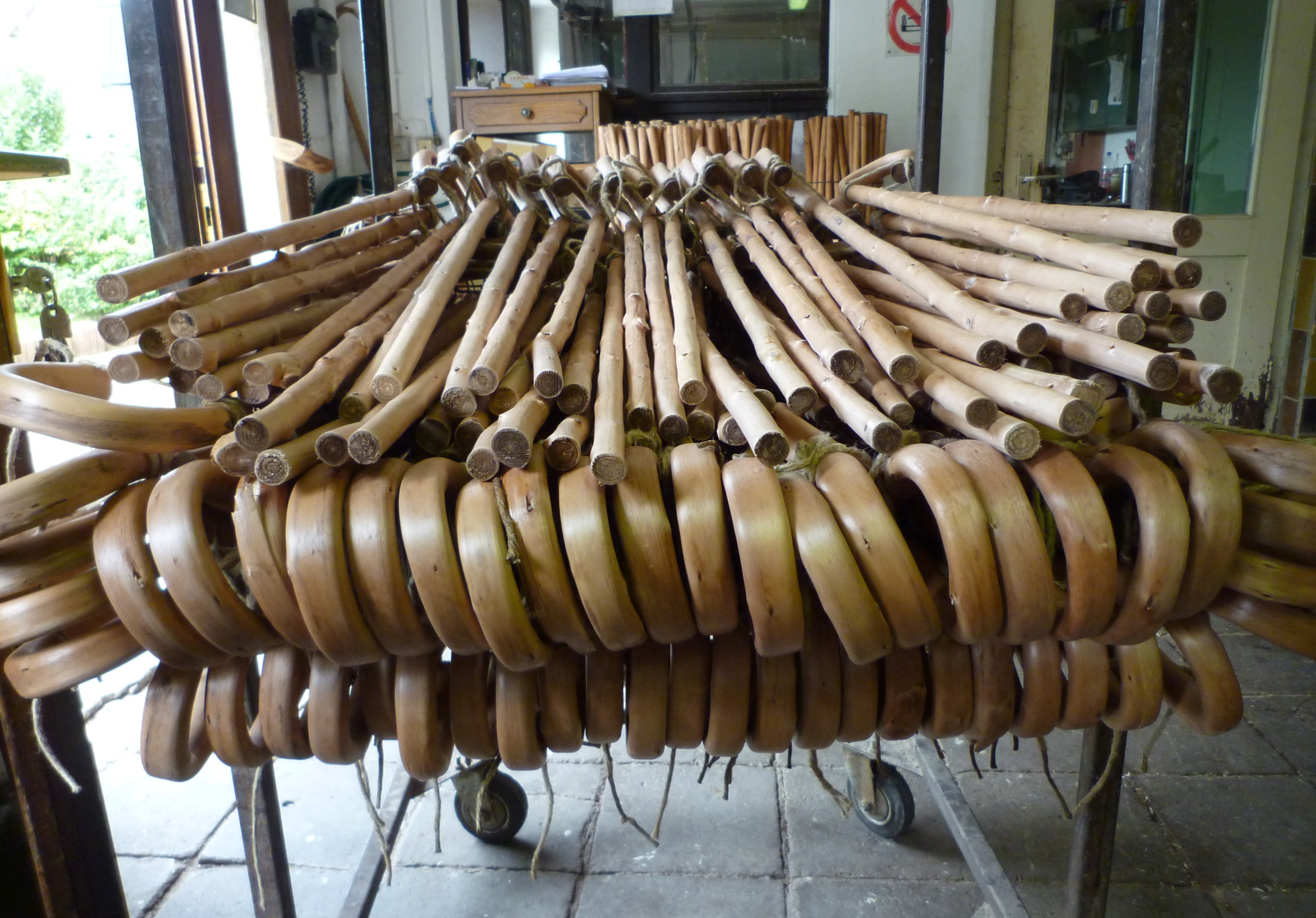 Lindewerra - Stockmachere